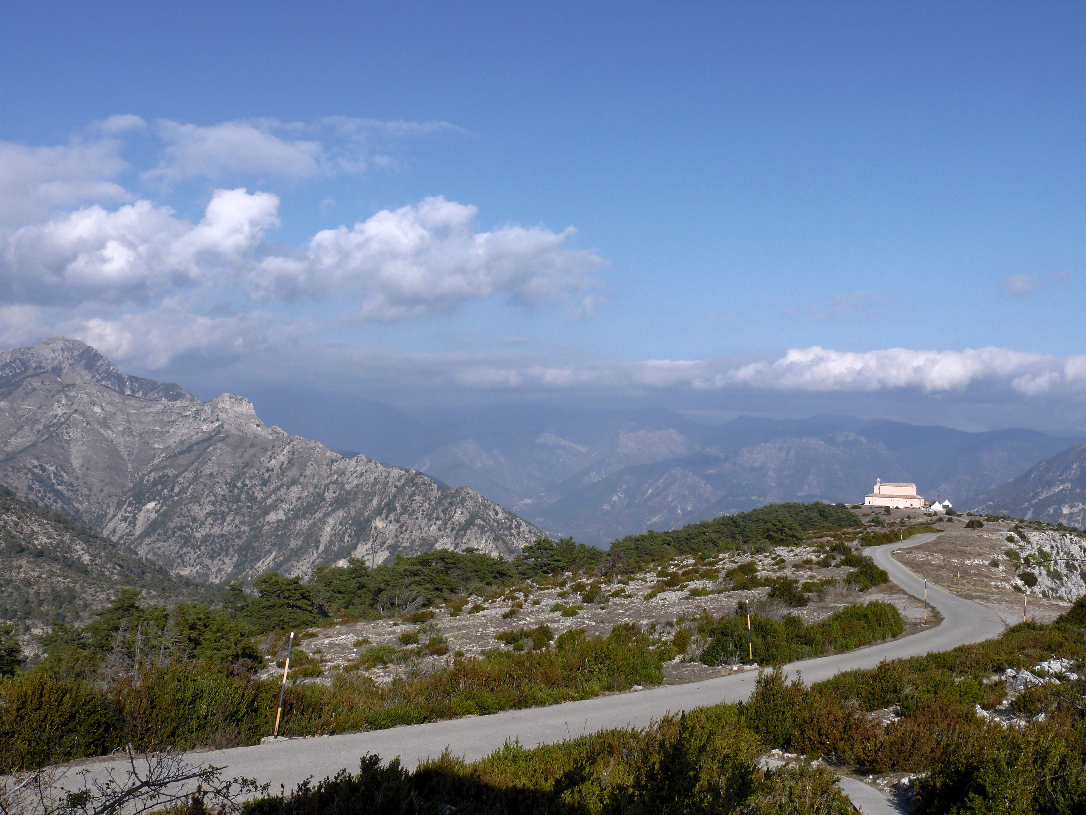 Madone d'Utelle - Route sur le sommet et sanctuaire, vue vers la vallée de la Vésubie